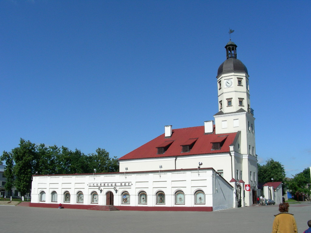 Беларуская (тарашкевіца): Гарадзкая ратуша з гандлёвымі радамі. г. Нясьвіж This is a photo of Belarusian heritage monument. Reference number: 611Г000474 ( WLM)